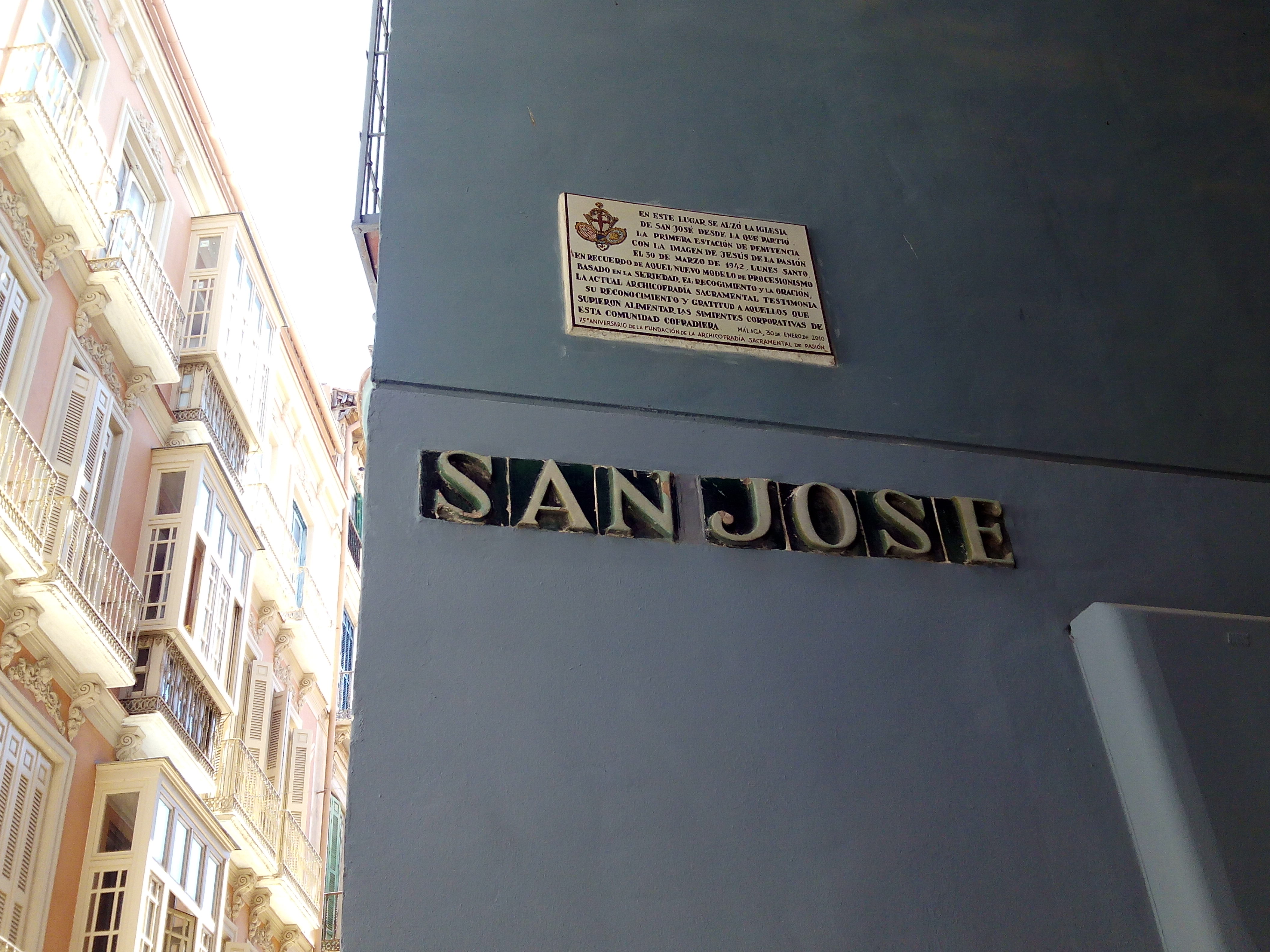 Placa conmemorativa situada en el lugar donde se erigía la llamada iglesia de San José, en Málaga (España).